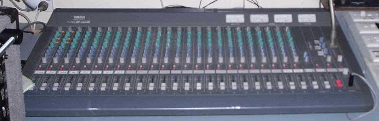 Yamaha MC2403 audio mixing console (1992)